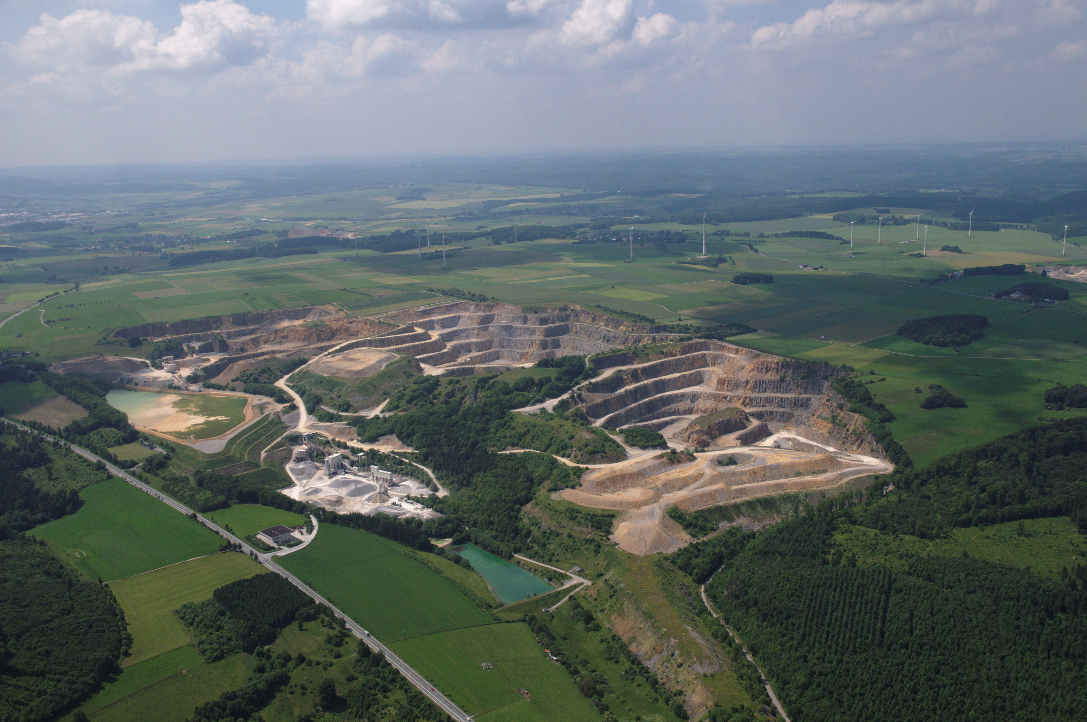 Fotoflug Sauerland-Ost: Bundesstraße 7; Kalkwerk und Kalksteinbruch Rösenbeck der Firma Rheinkalk Messinghausen in Messinghausen und links hinten (s. Markierung) Steinbruch der Firma Mühlenbein; dahinter Windkraftanlagen bei Auf dem Hamm The making of this document was supported by the Community-Budget of Wikimedia Germany.